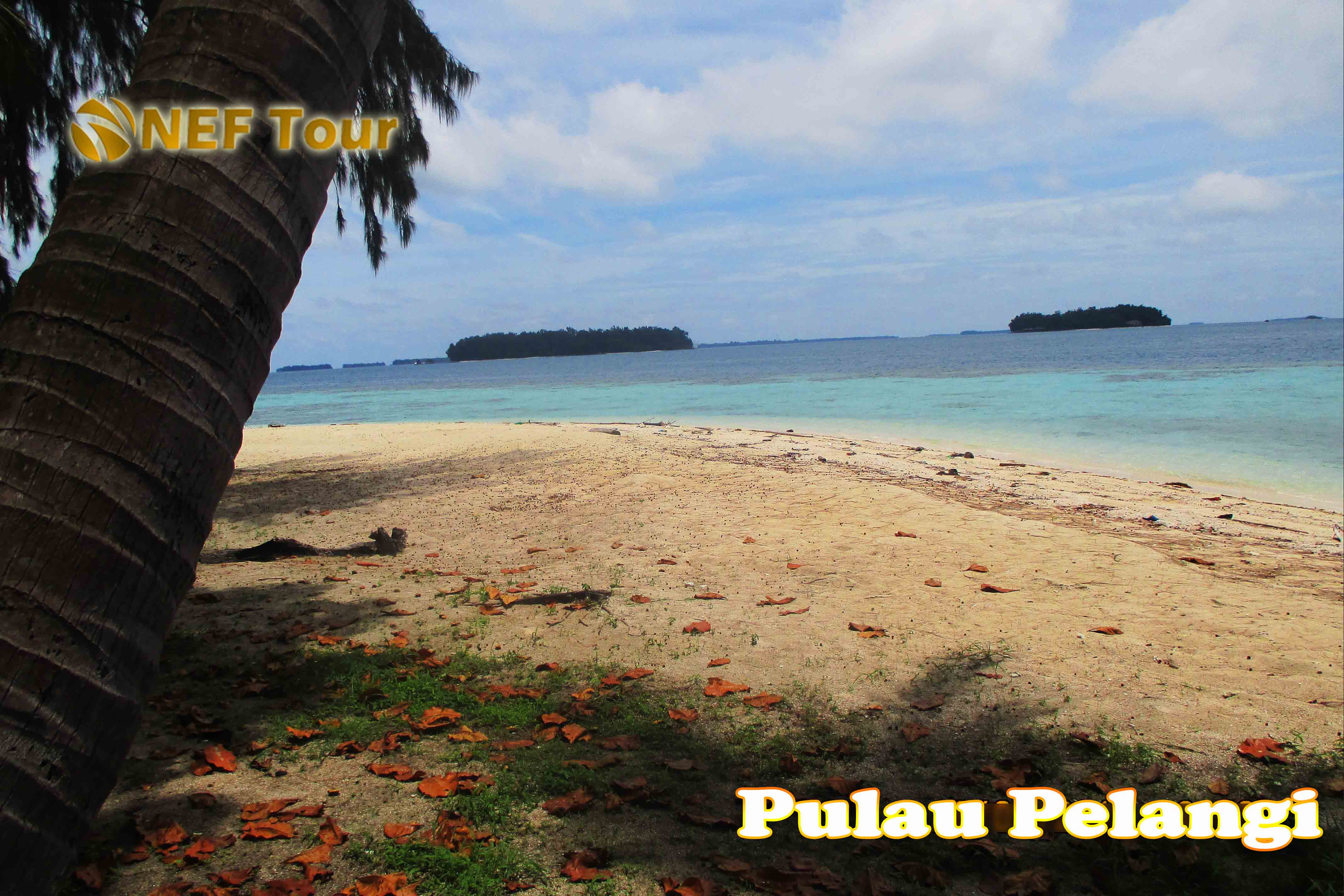 Pantai Di Pulau Pelangi